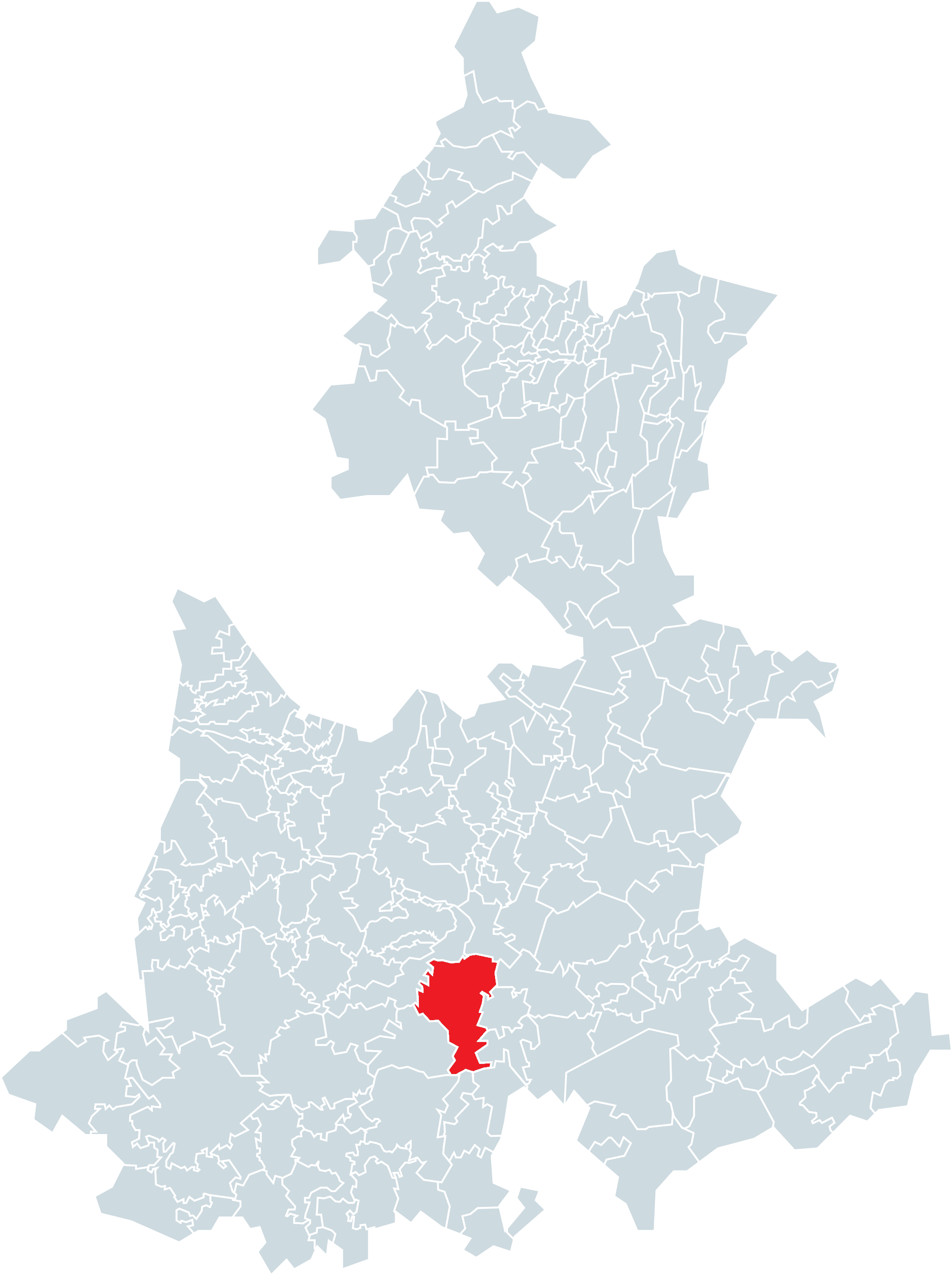 Municipio de Tepexi de Rodríguez